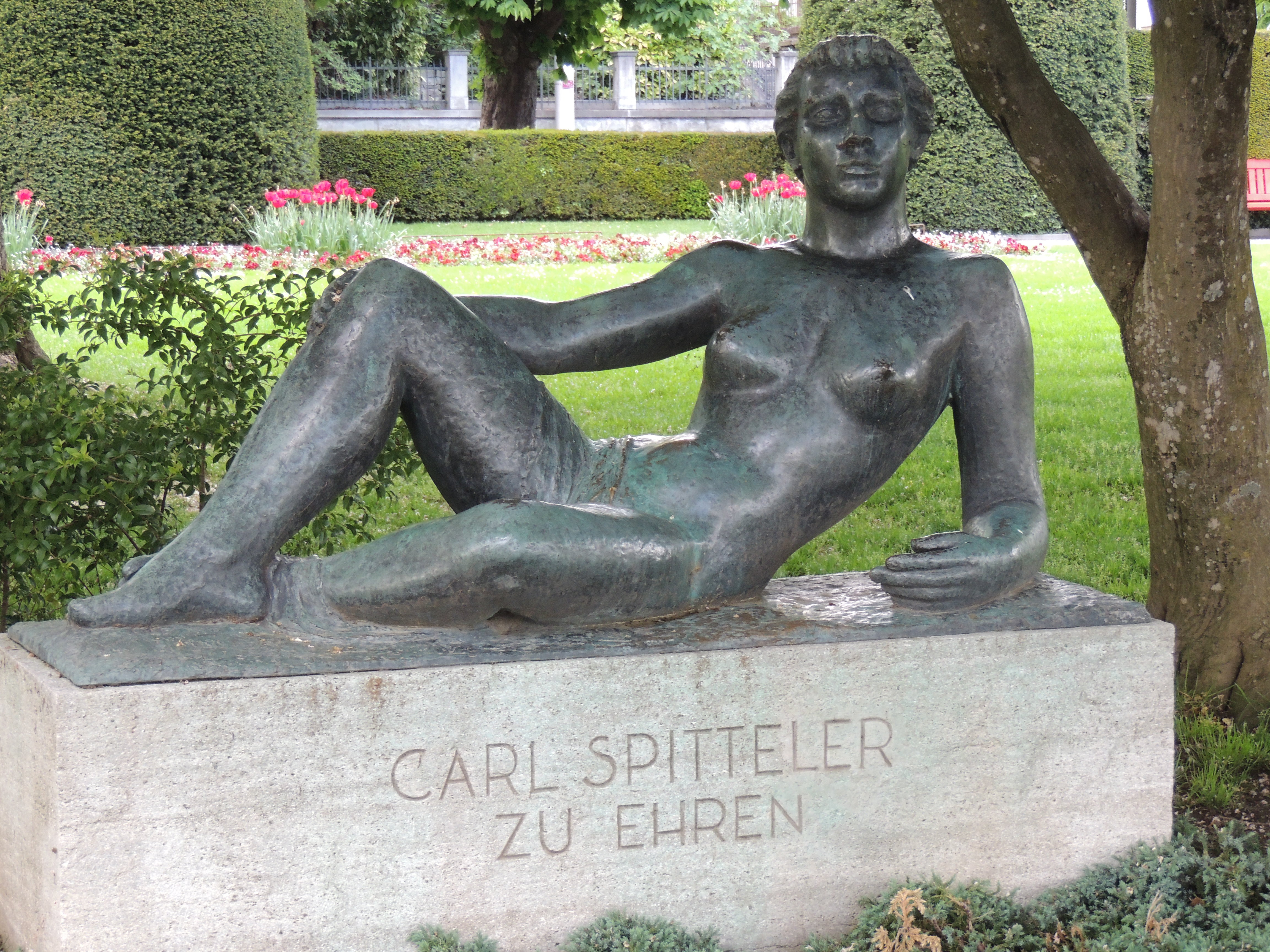 Die Liegende, Kunstwerk von Roland Duss (1940)